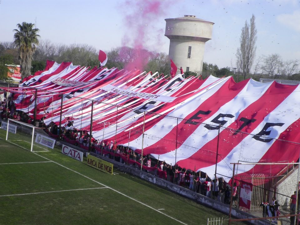 La hincha de San Martín de Mendoza en el año 2005.